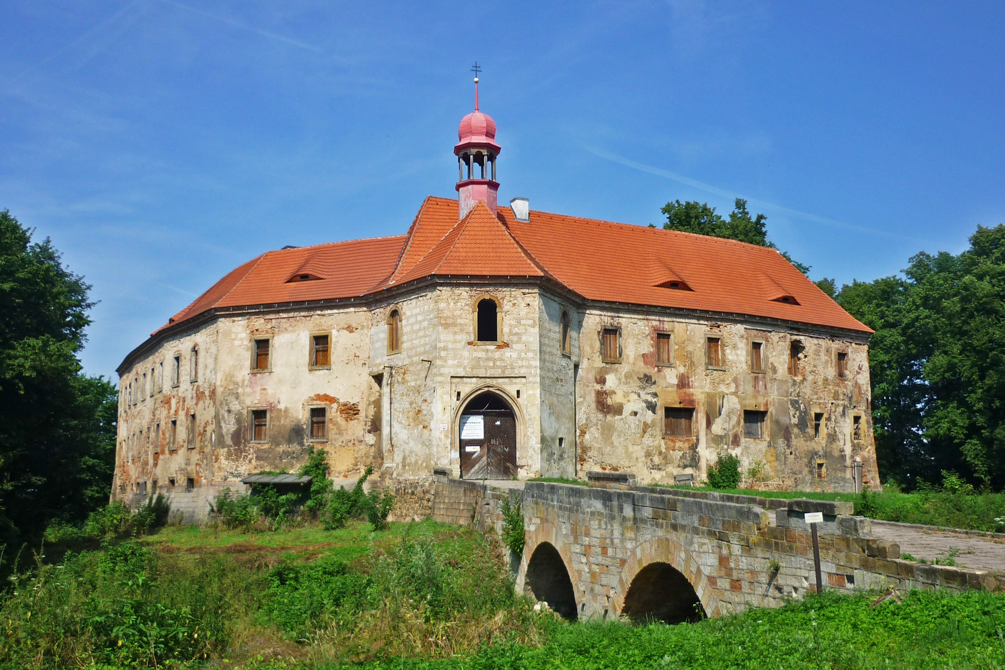 Schloss Wartenberg in Wartenberg am Roll (Stráž pod Ralskem)